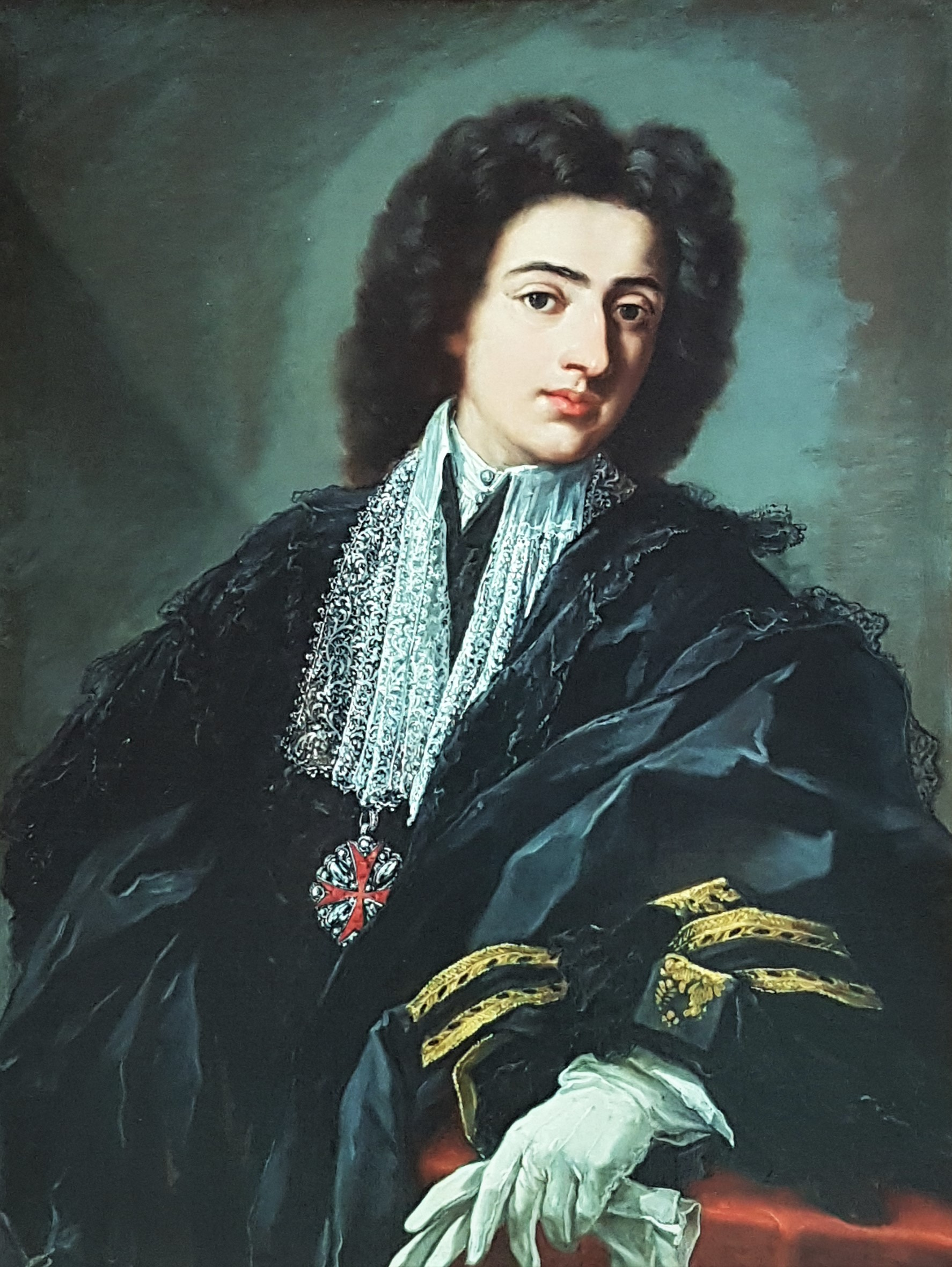 Carlo Albani, Gemälde von Pier Leone Ghezzi